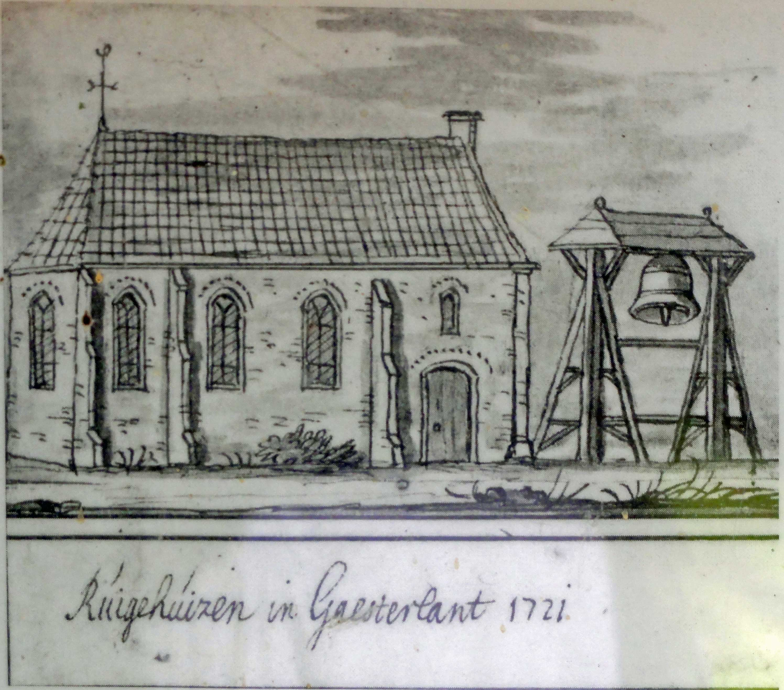 Vroegere kerk van Ruigahuizen